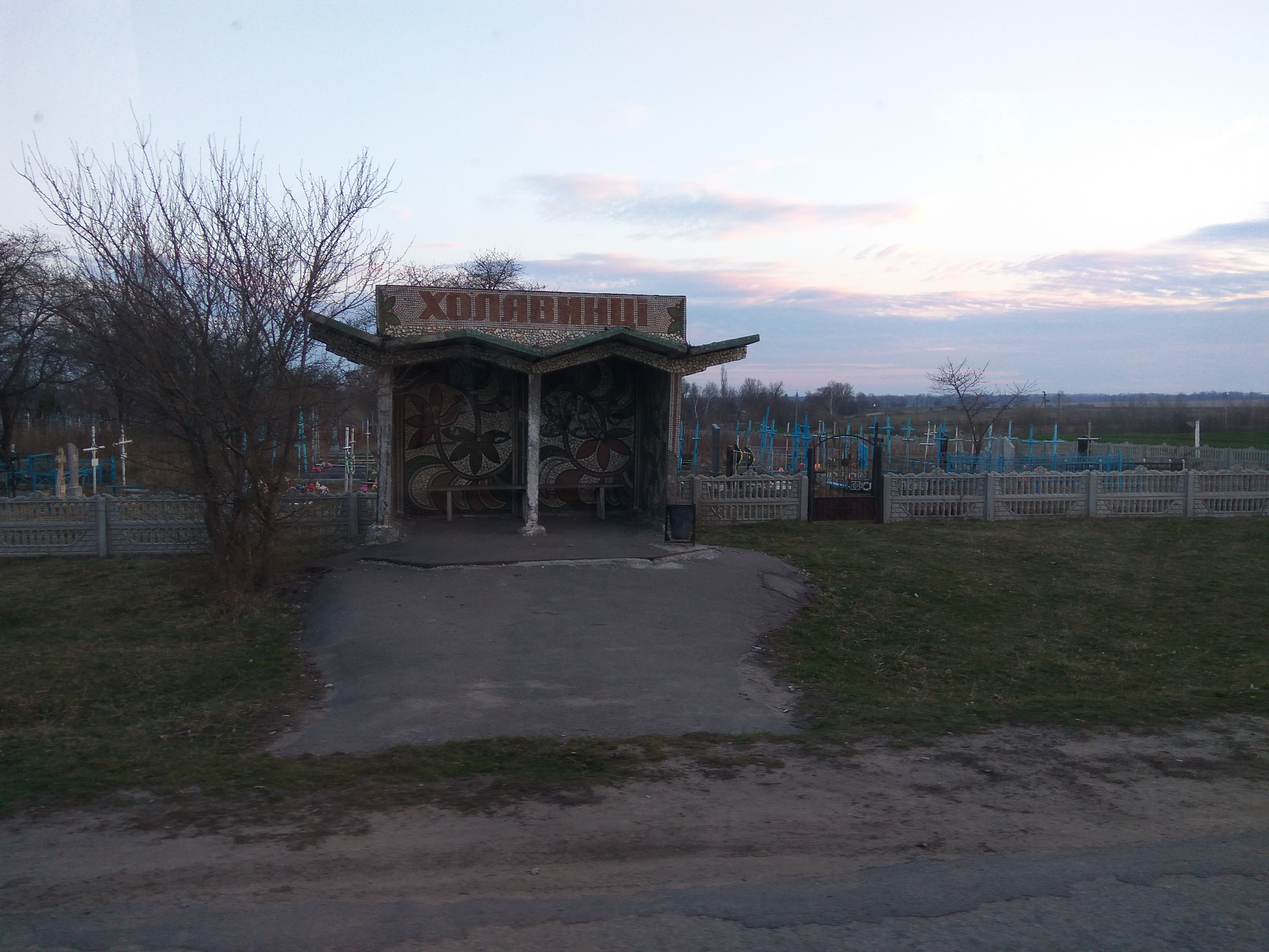 Автобусна зупинка в колишньому селі Холявинці